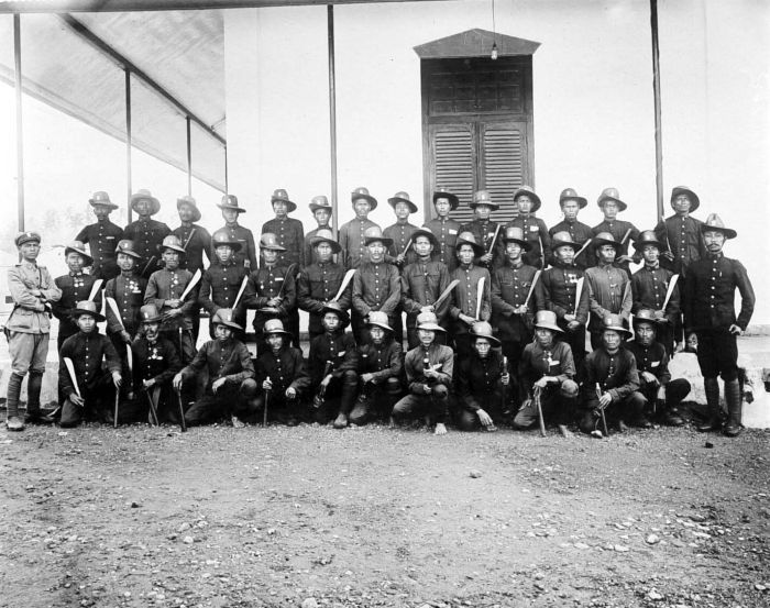 Repronegatief. Brigade Cultuurpolitie van Suikeronderneming Medarie te Yogyakarta, Java